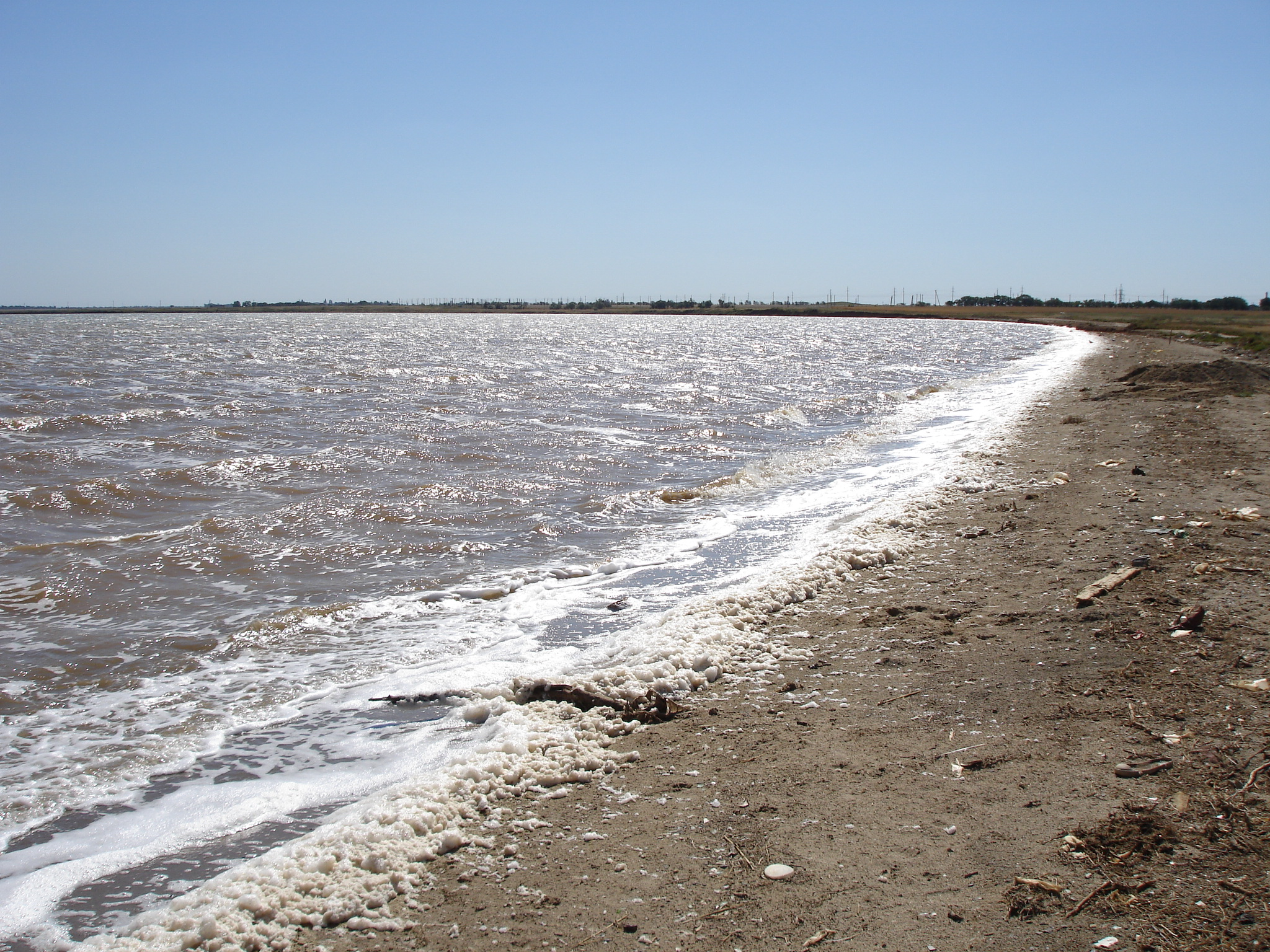 Сасикський, Сакський р-н за межами населених пунктів Лесновської, Охотніковської, Суворівської сільських рад